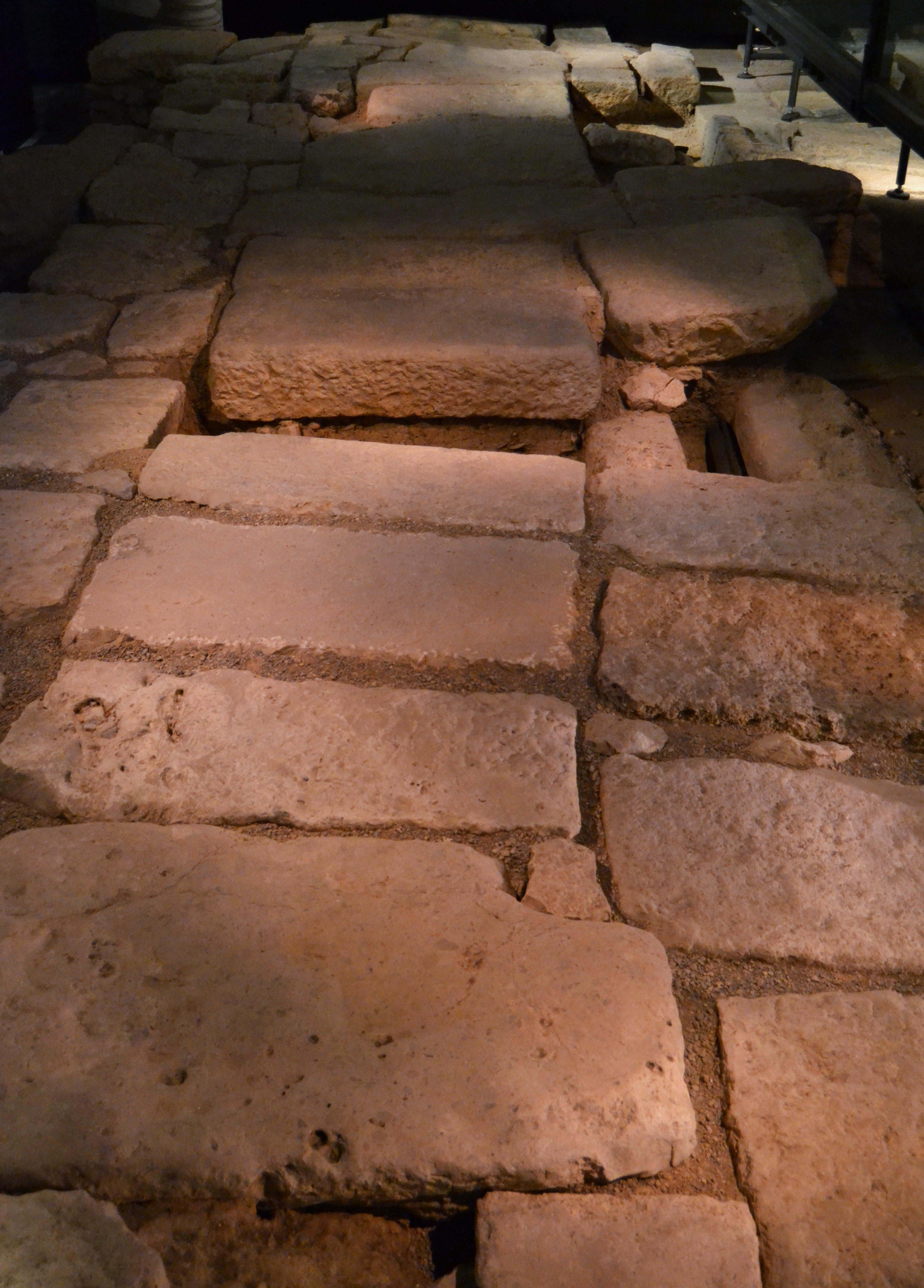 Cardo de Valentia, centre arqueològic de l'Almoina.